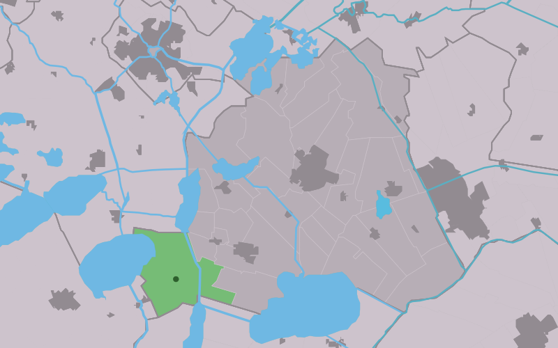 Kaartsje fan himrik fan Tsjerkgaast